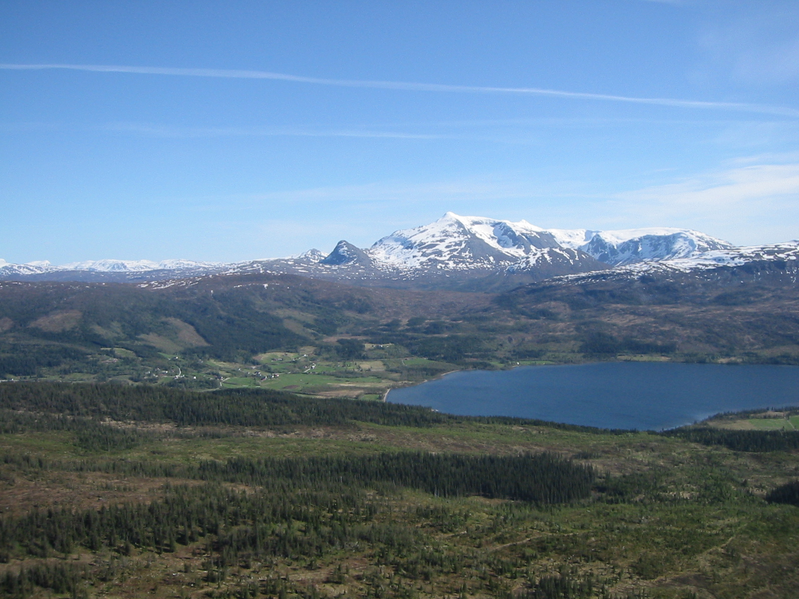 Drevvatnet sett fra Tovenfjellet. Lukttinden i bakgrunnen.